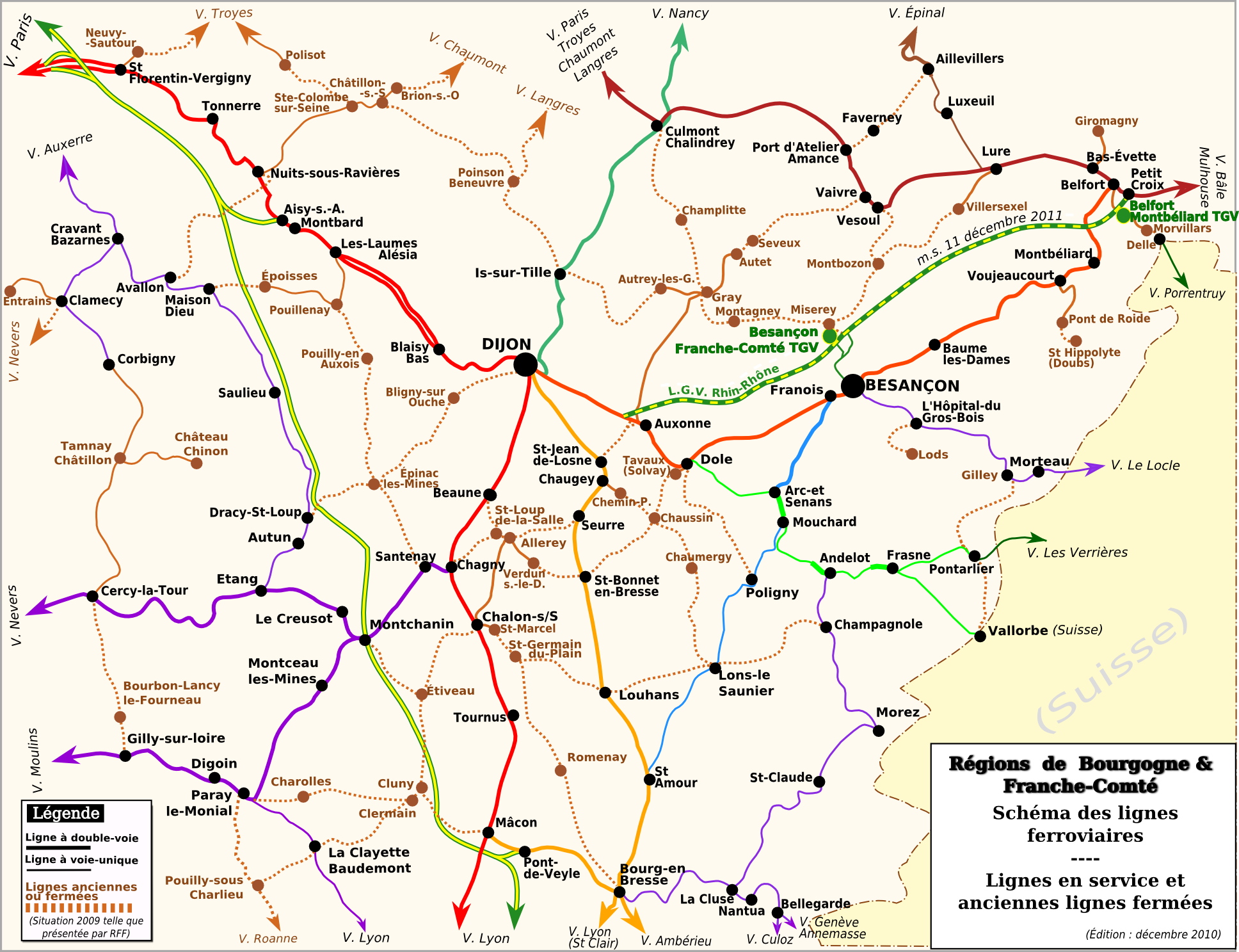 Réseau ferroviaire. Lignes ferroviaires des régions Bourgogne et Franche-Comté.